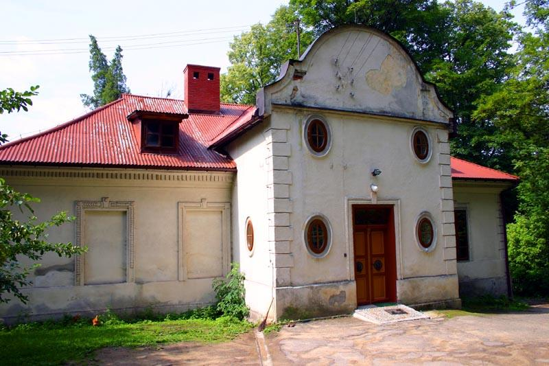 Kamesznica (Polska)